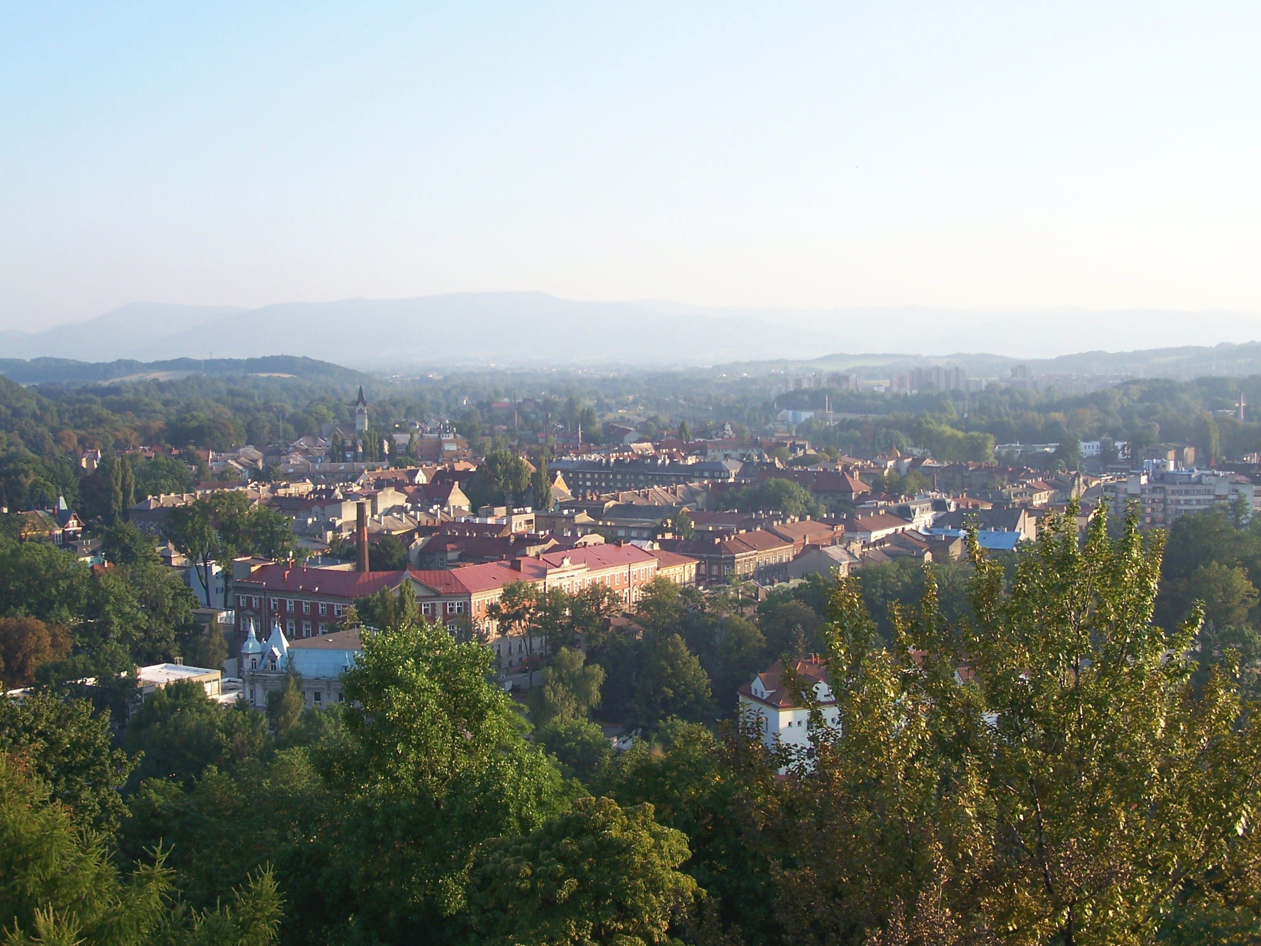 Panorama miasta z Wieży Piastowskej w Cieszynie.